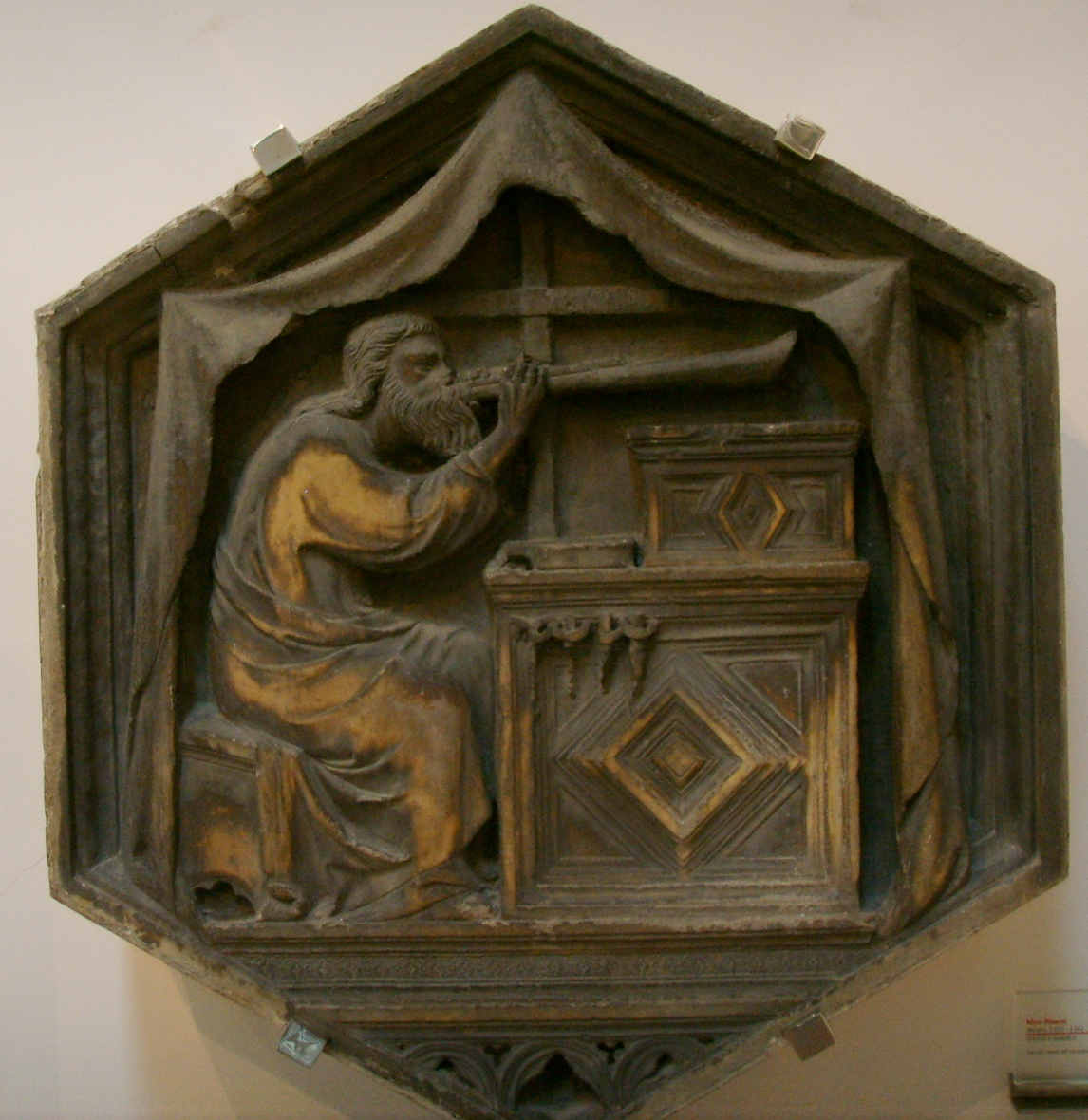 Formella 05, jubal, nino pisano, 1334-1336